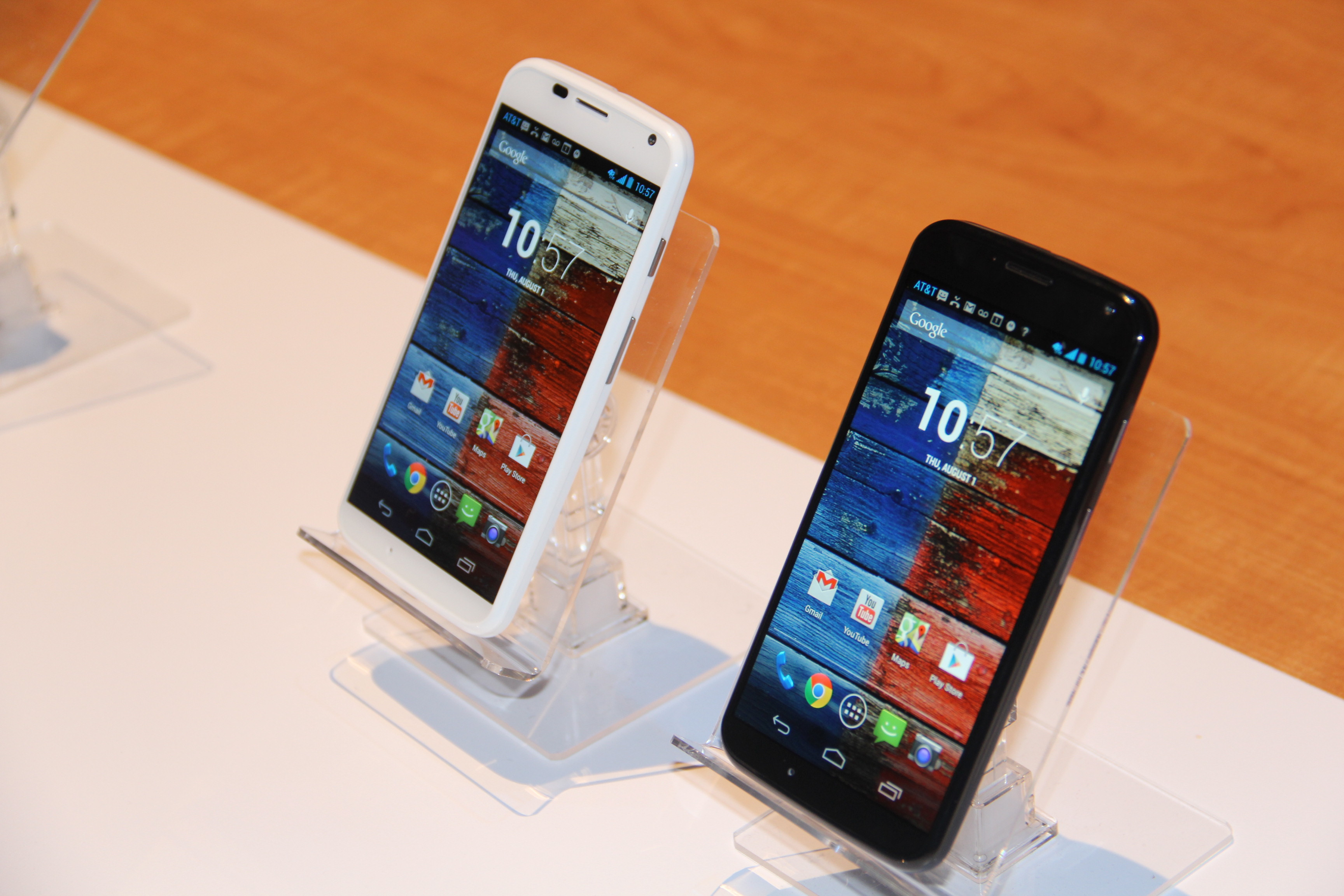 Moto X смартфон